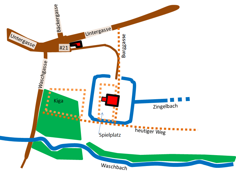 Lage der Burg in Berstadt im Vergleich zu heute (Veränderungen gestrichelt eingetragen)